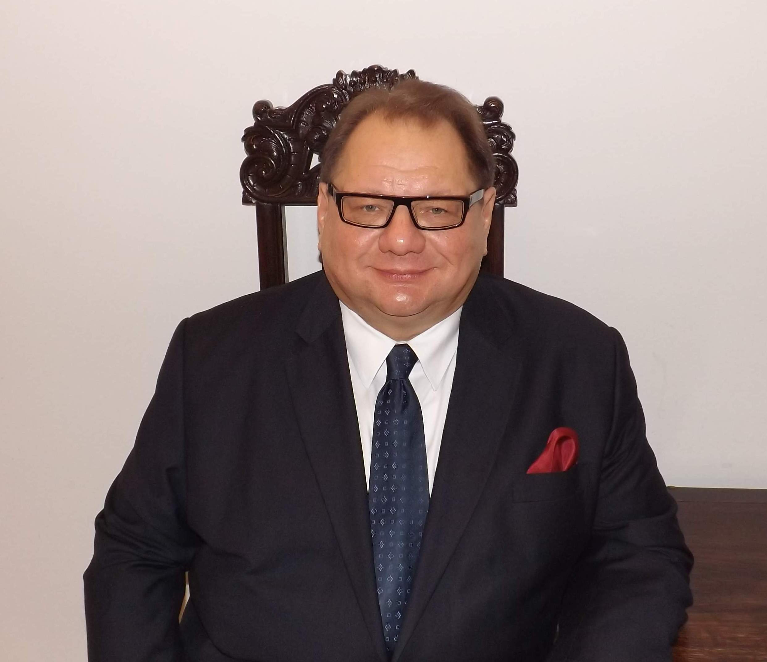 Poseł Ryszard Kalisz